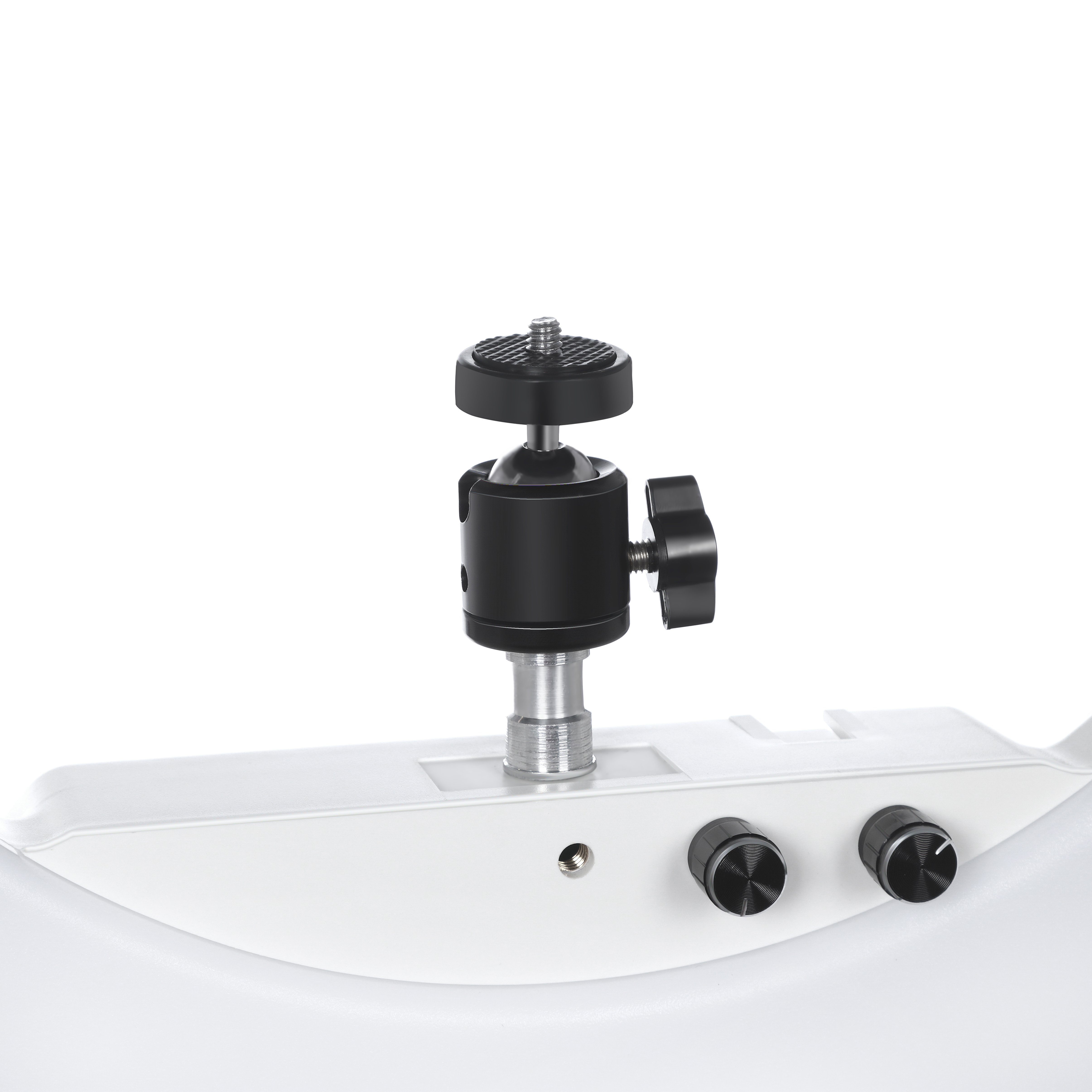 Два диммера-регулятора спереди лампы, позволяют регулировать теплоту света и яркость.